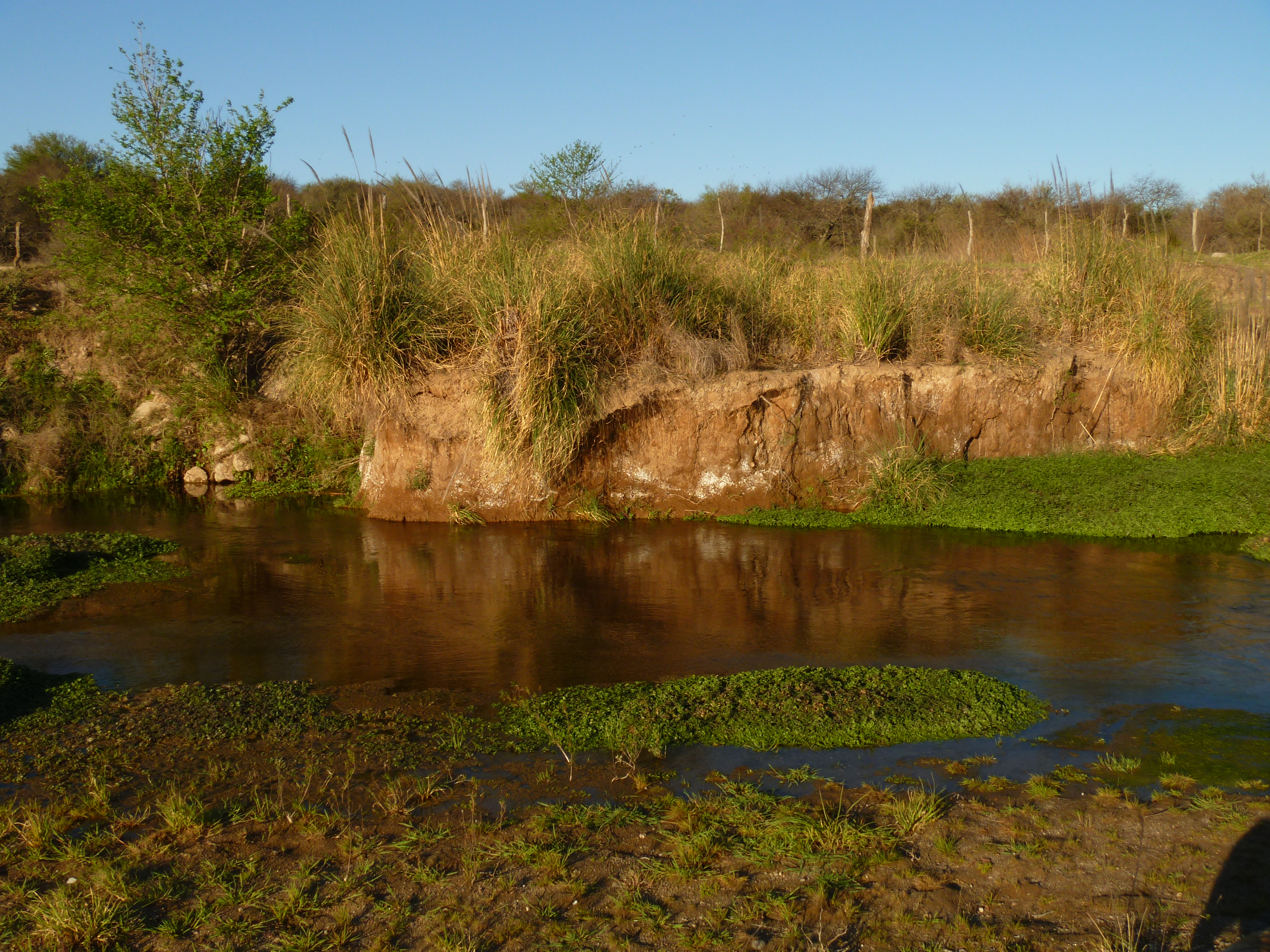 ciudad de villa mercedes san luis